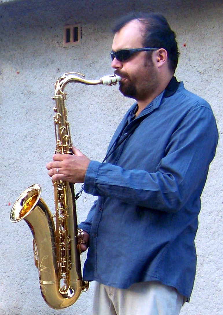 Concert à Entrevennes, Alpes de Haute-Provence, France.